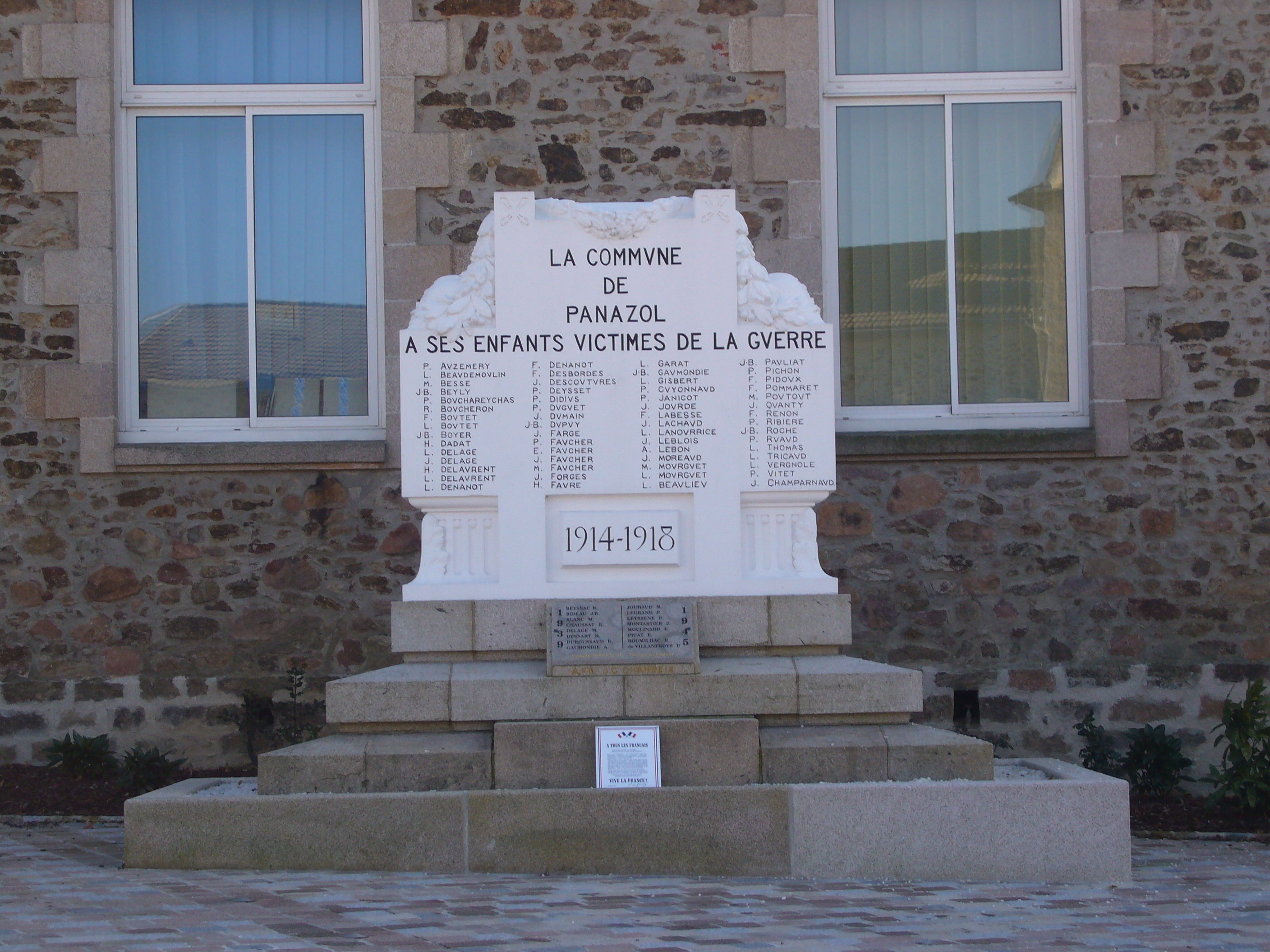 Le monument aux morts de Panazol (87, France)